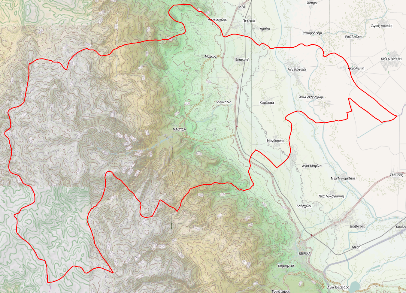 Τοπογραφικός χάρτης του Δήμου Νάουσας